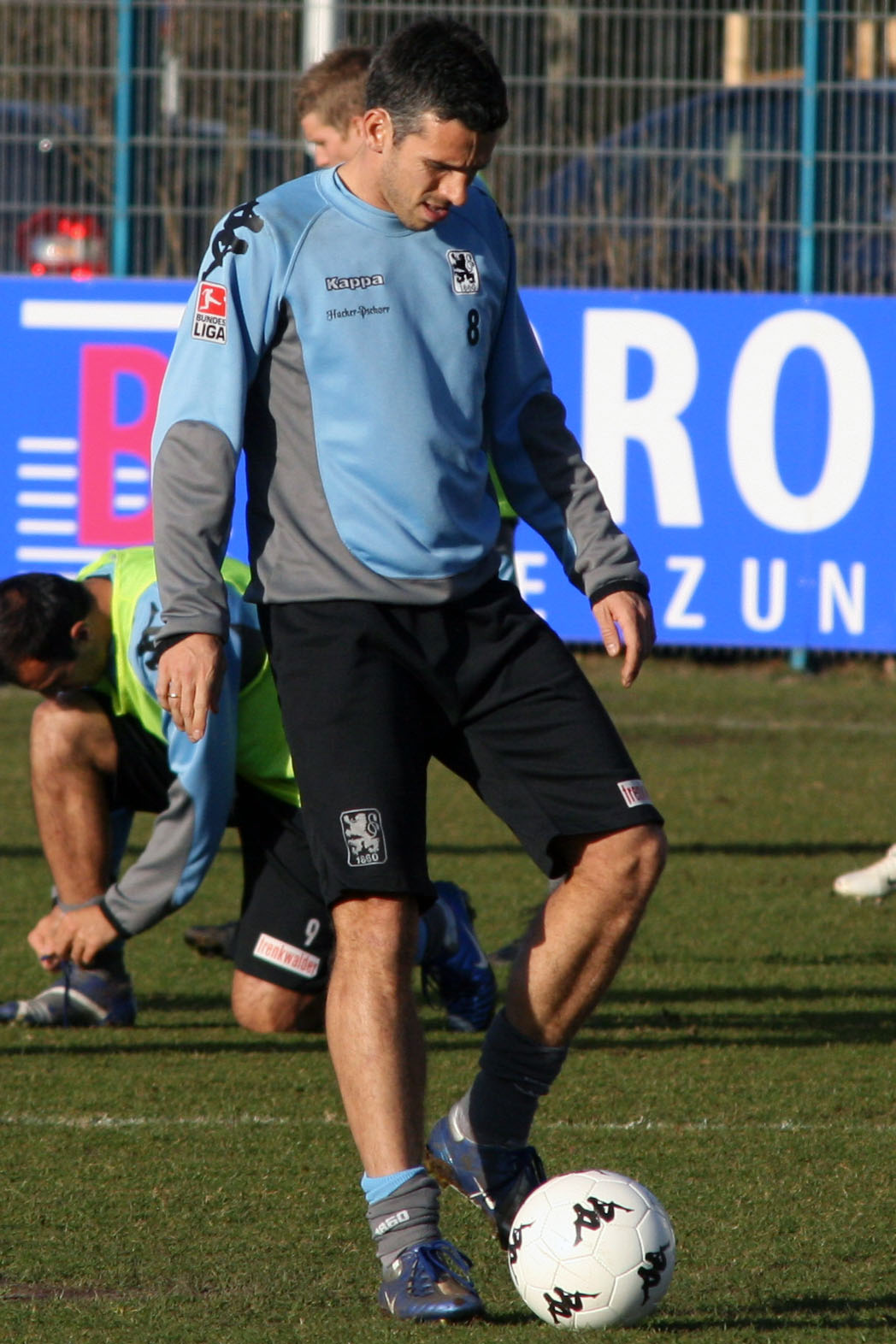 Danny Schwarz, player of TSV 1860 München, training, 20.01.2007, Grünwalder Str., Munich